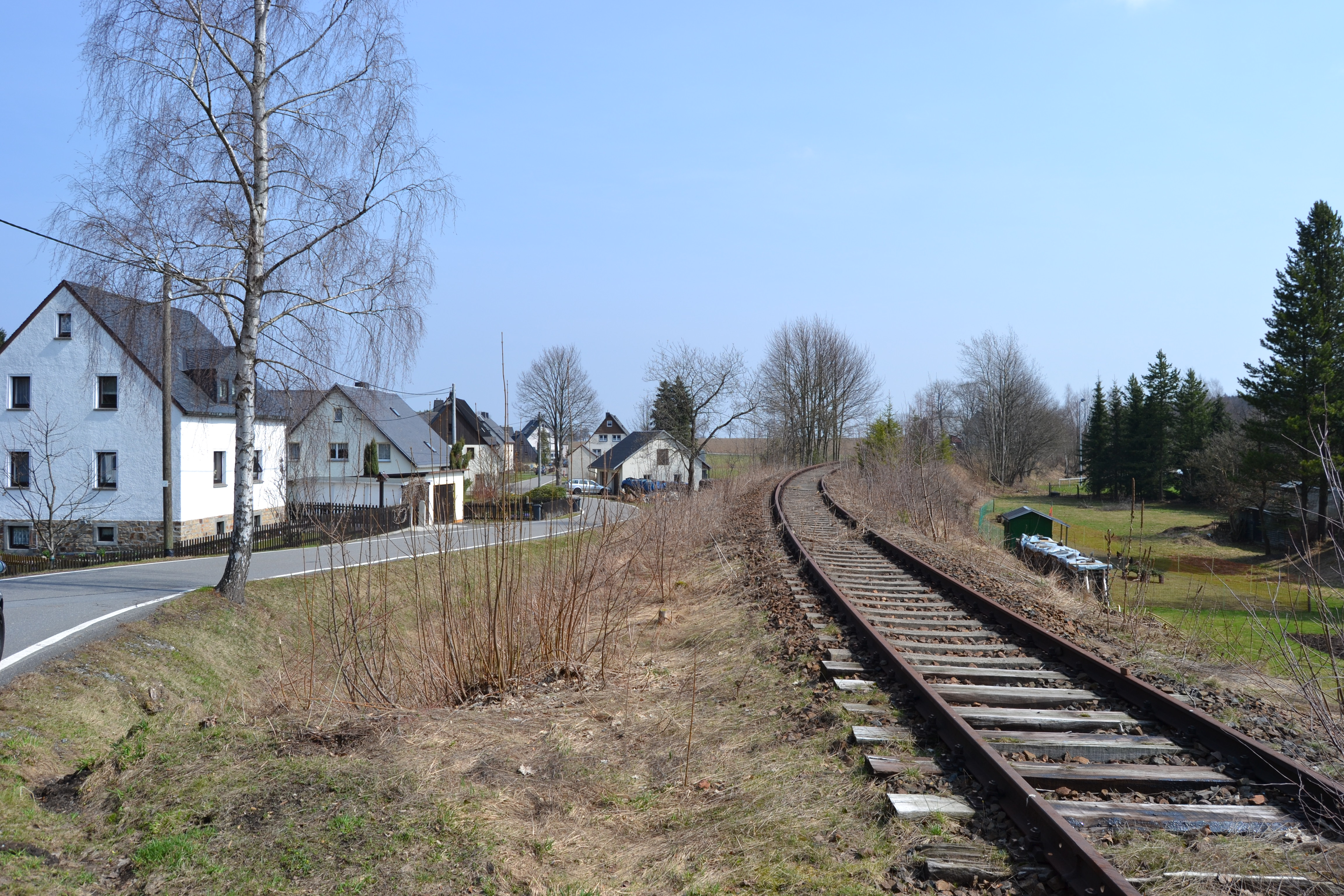 Blick auf einen kleinen Teil der Siedlung Gelobtland (Gemeindeteil der Bergstadt Marienberg) im mittleren Erzgebirge, im Bild rechts das Gleis des zwischen Reitzenhain und Marienberg stillgelegten Teilabschnittes der Bahnstrecke Reitzenhain-Flöha